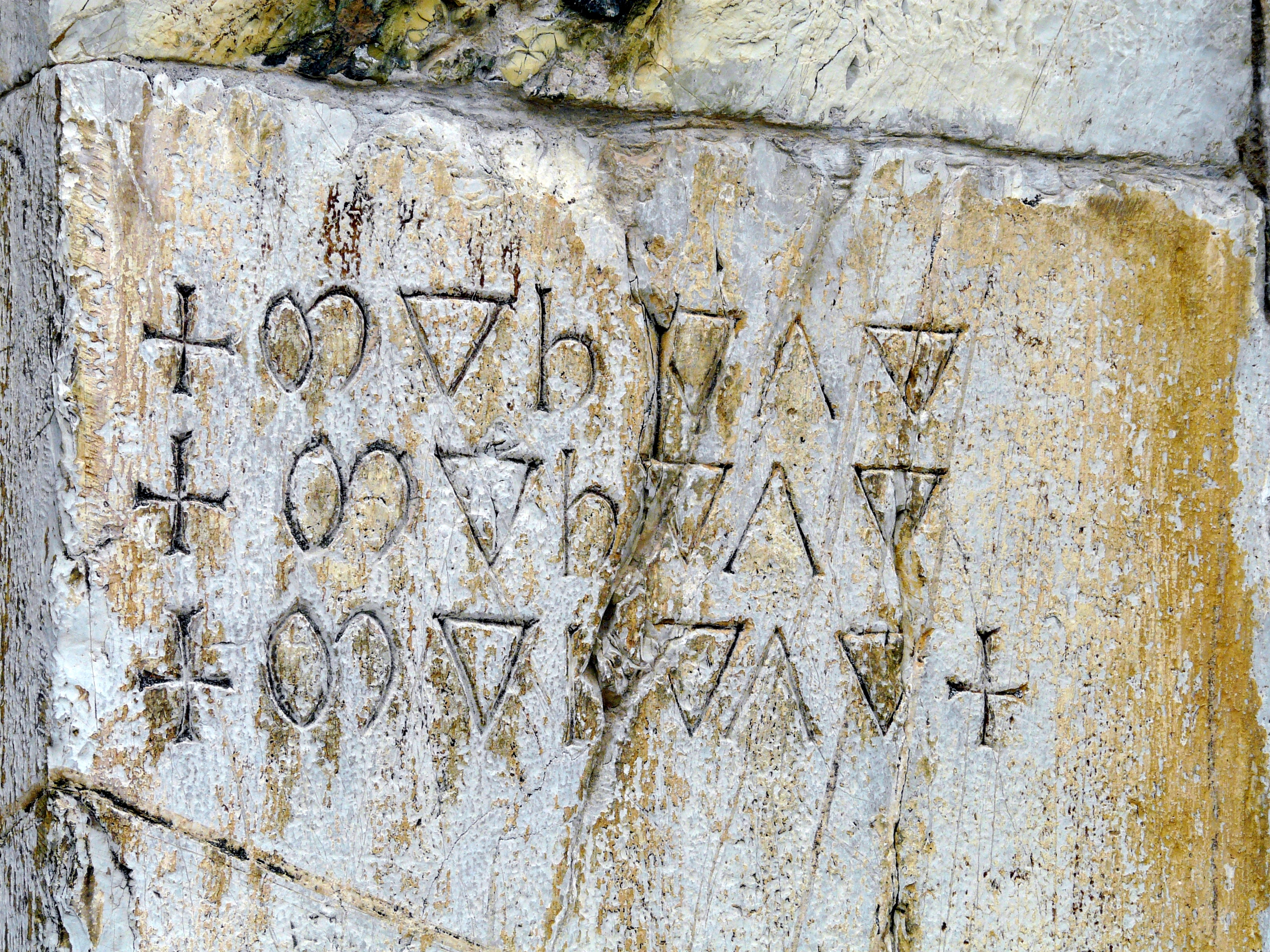 Iscrizione presso il duomo di Barga, Toscana, Italia